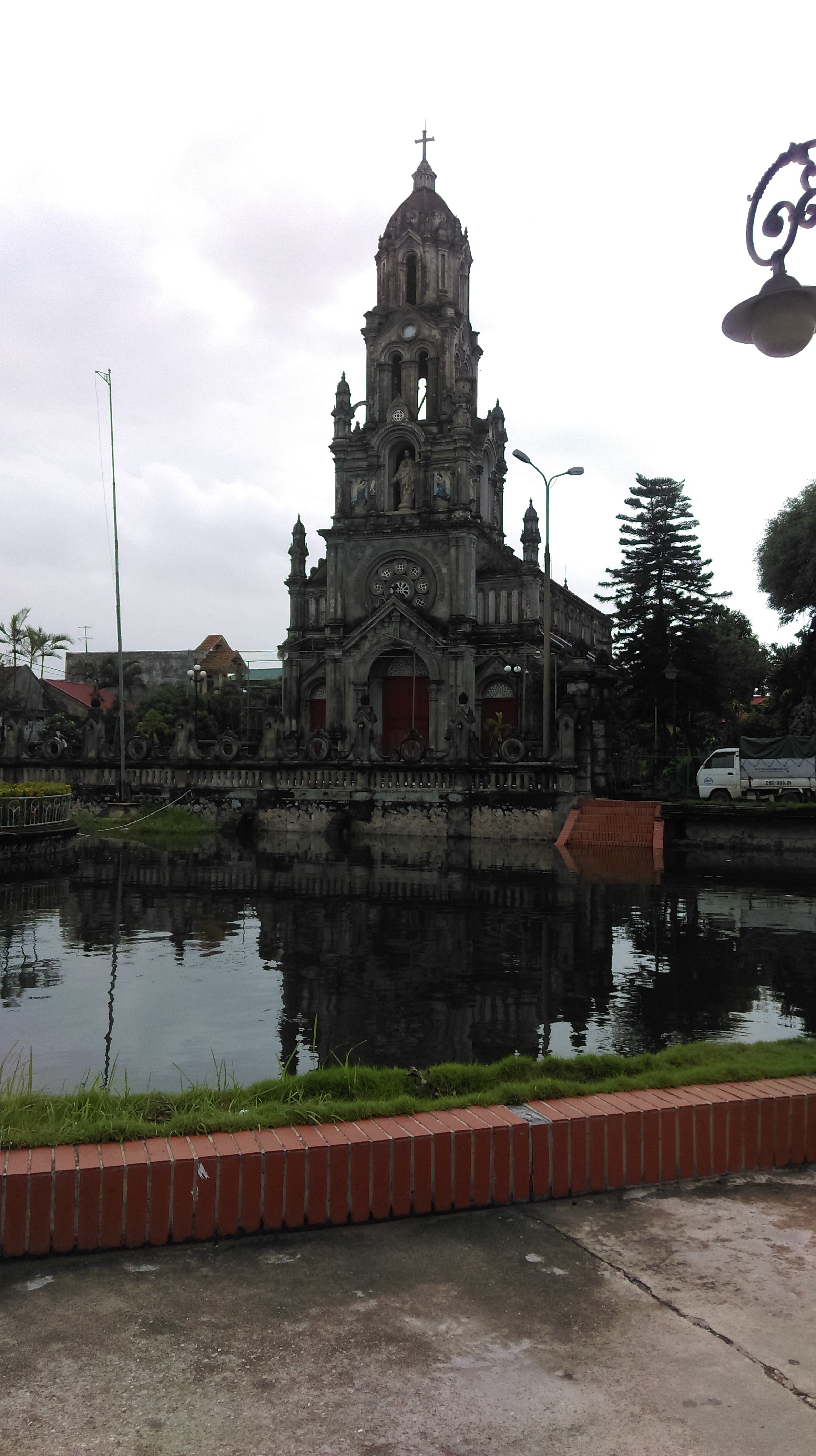 Nhà thờ Giáo xứ Phú Mỹ, Phú Xuyên, Hà Nội